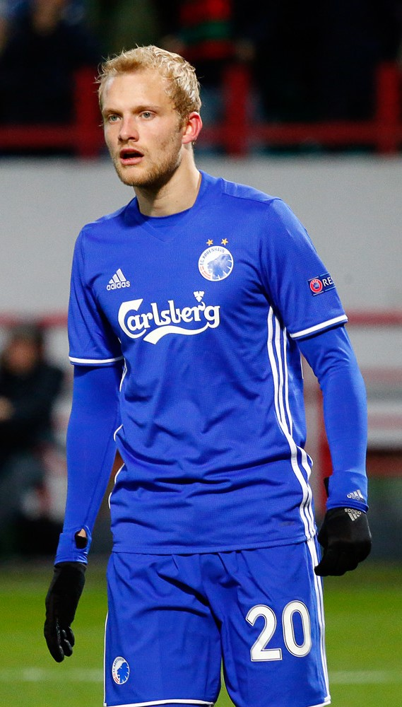 Nicolai Boilesen